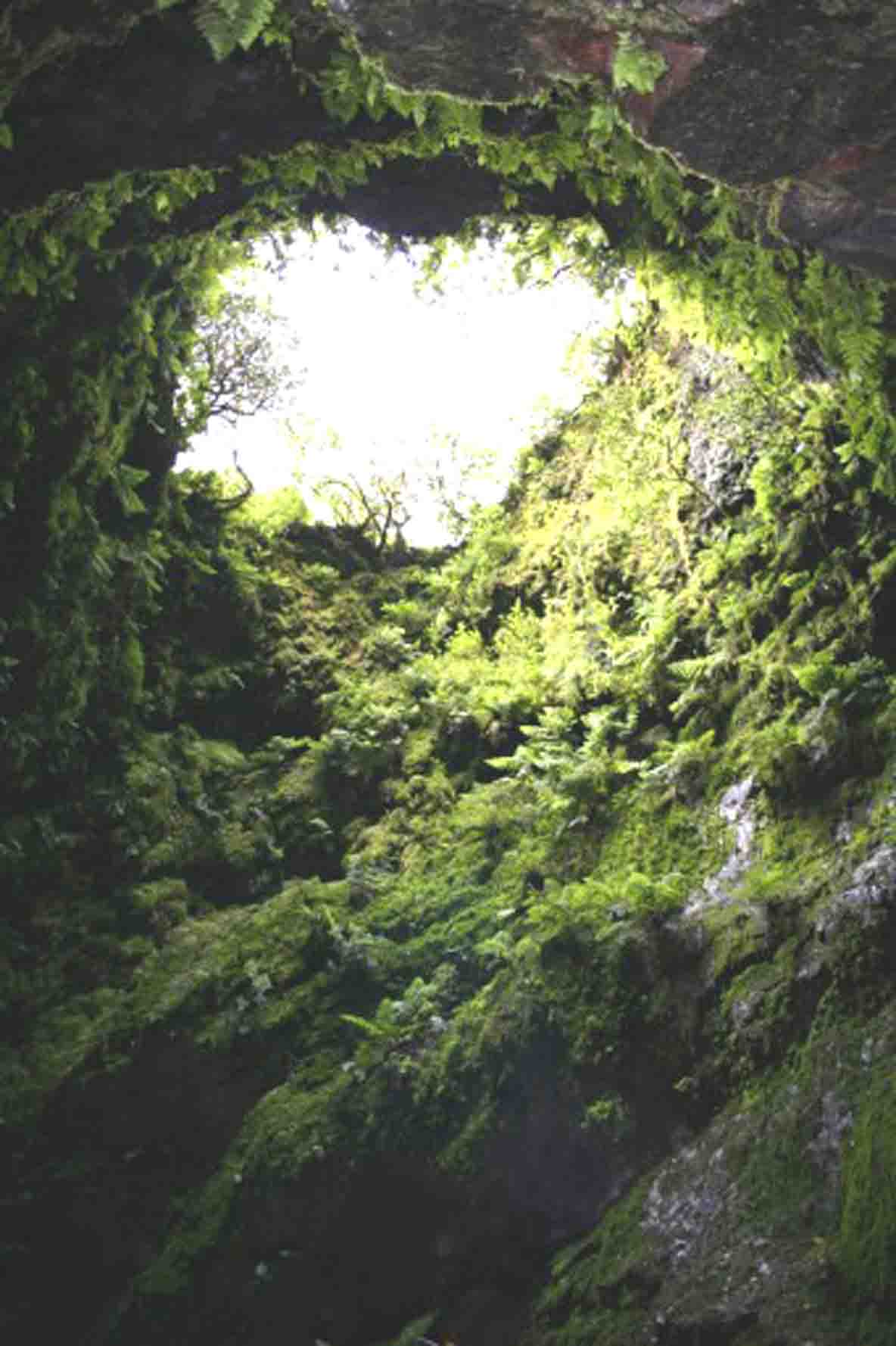 Algar do Carvão, Ilha Terceira, Açores - Portugal.